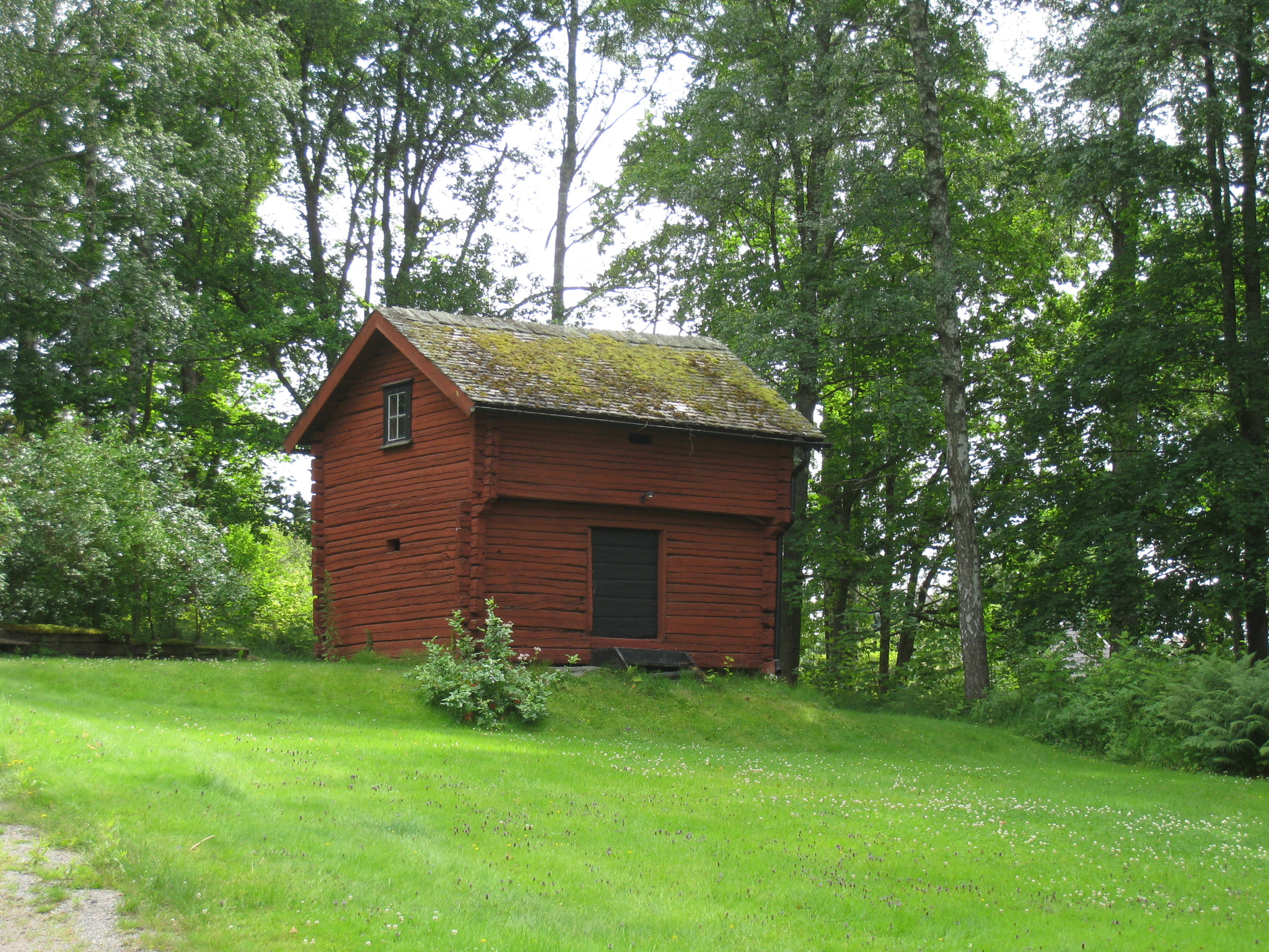 Visthusbod, Rackstadmuseet, trädgården vid Oppstuhage, Arvika, Värmland.